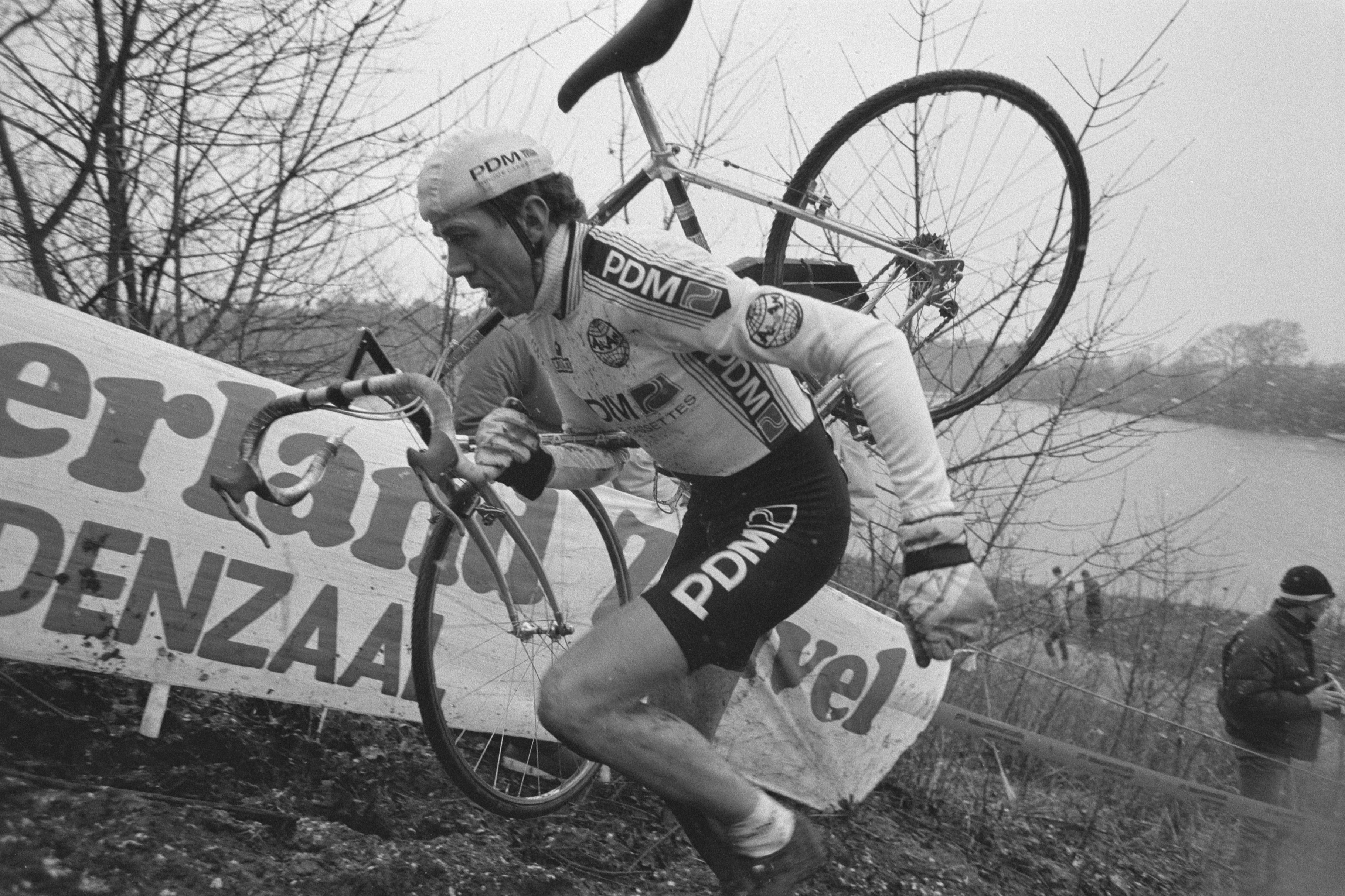 Collectie / Archief : Fotocollectie Anefo Reportage / Serie : [ onbekend ] Beschrijving : NK veldrijden 1987 in Oldenzaal; Nederlands kampioen Hennie Stamsnijder in actie Datum : 4 januari 1987 Locatie : Oldenzaal Trefwoorden : VELDRIJDEN, kampioenen Persoonsnaam : Hennie Stamsnijder Fotograaf : Bogaerts, Rob / Anefo Auteursrechthebbende : Nationaal Archief Materiaalsoort : Negatief (zwart/wit) Nummer archiefinventaris : bekijk toegang 2.24.01.05 Bestanddeelnummer : 933-8530